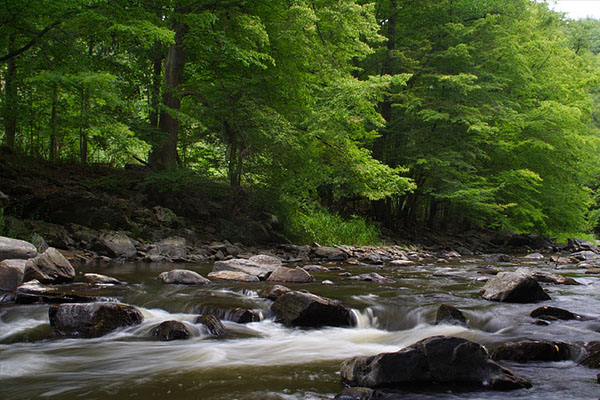 Údolí Oslavy a Chvojnice - řeka Oslava